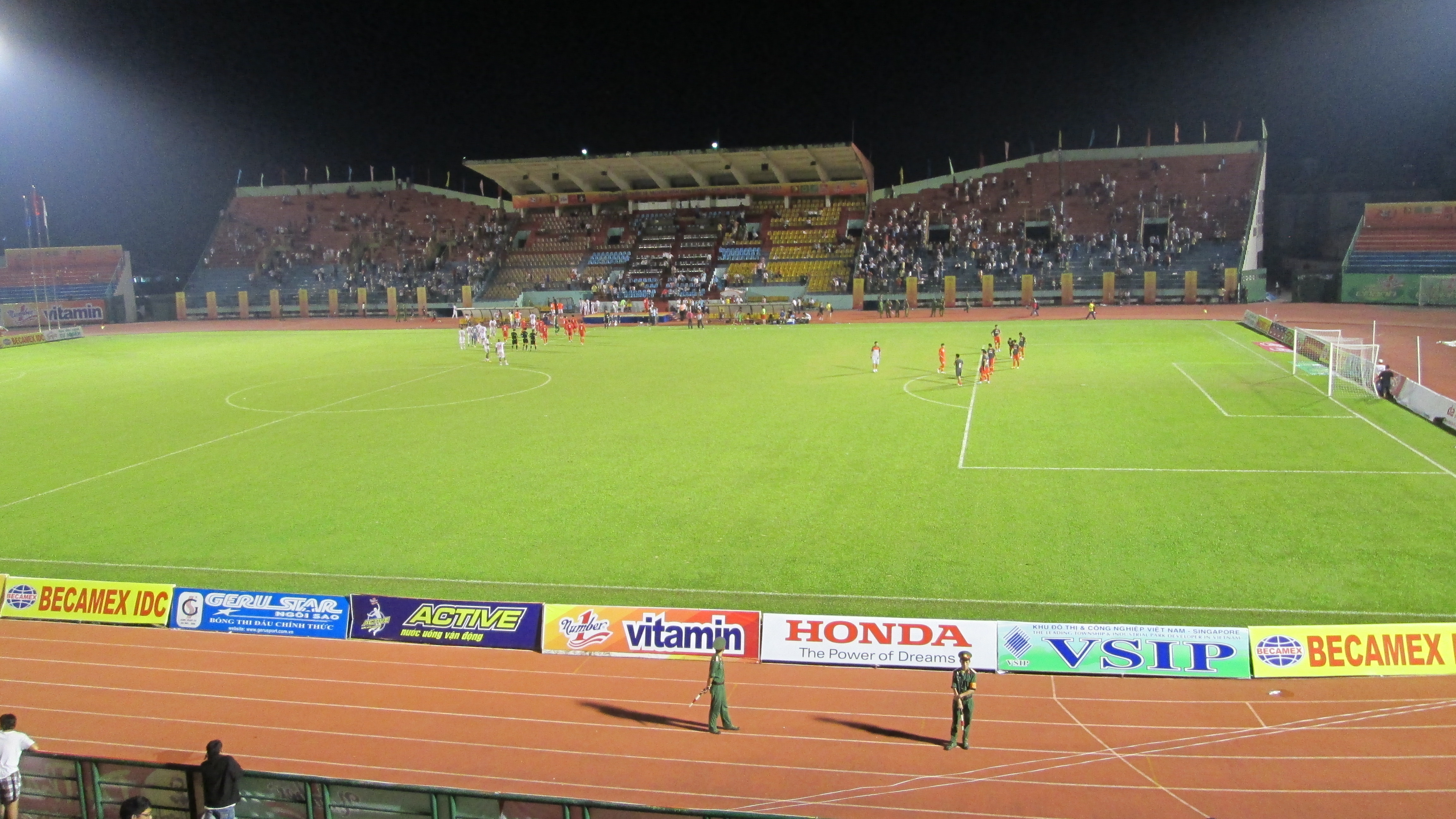 Sân vận động Gò Đậu, Bình Dương. Trận đấu giữa U23 Việt Nam và Bangu Atlestico Clube